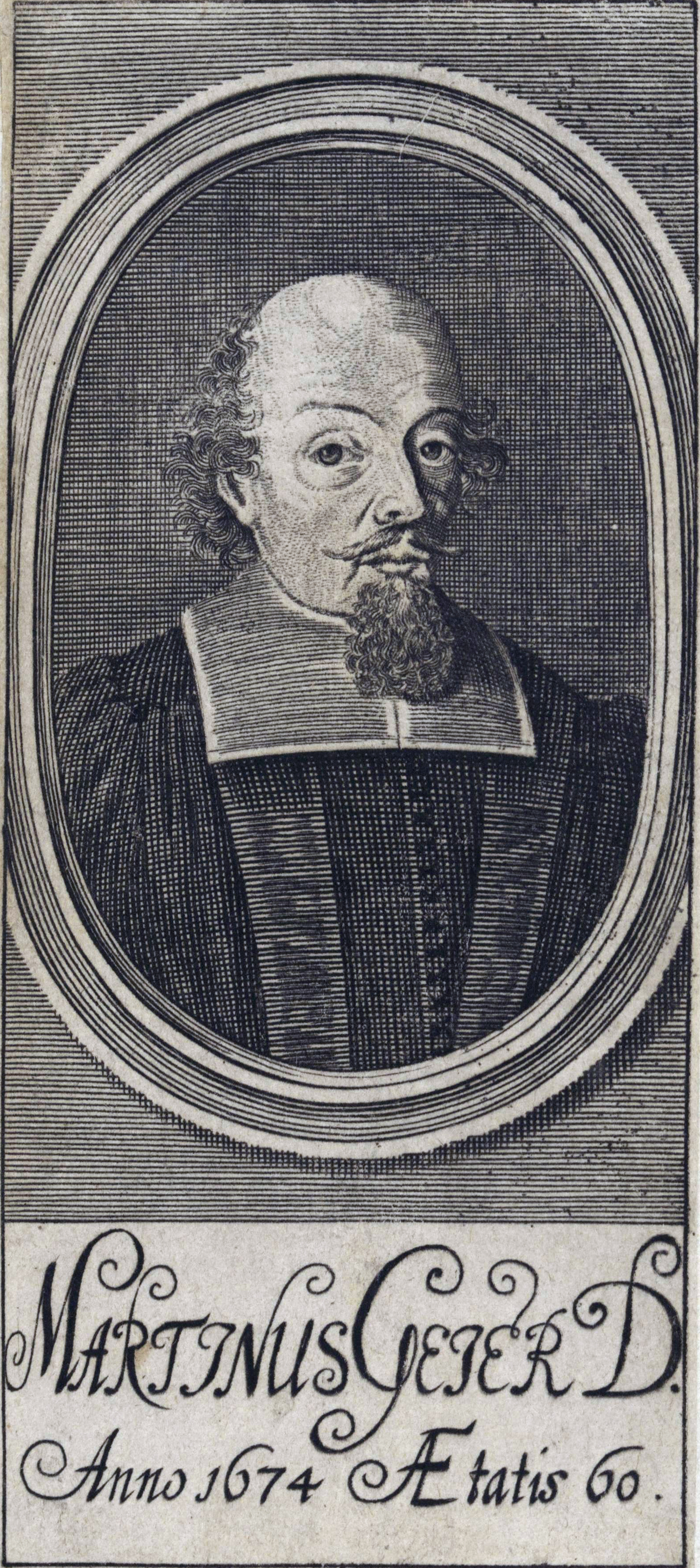 Der deutsche Theologe Martin Geier (1614–1680)